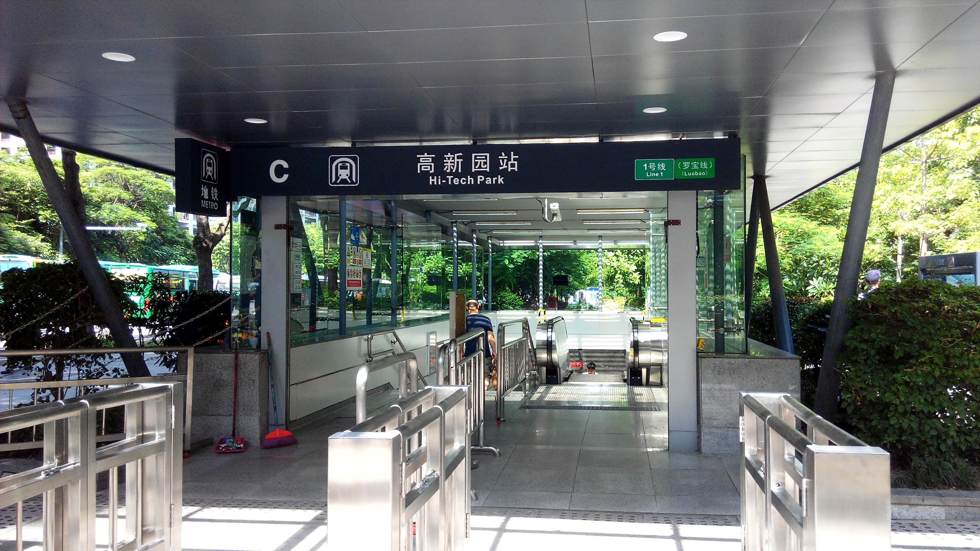 深圳地铁1号线 高新园站 C出口